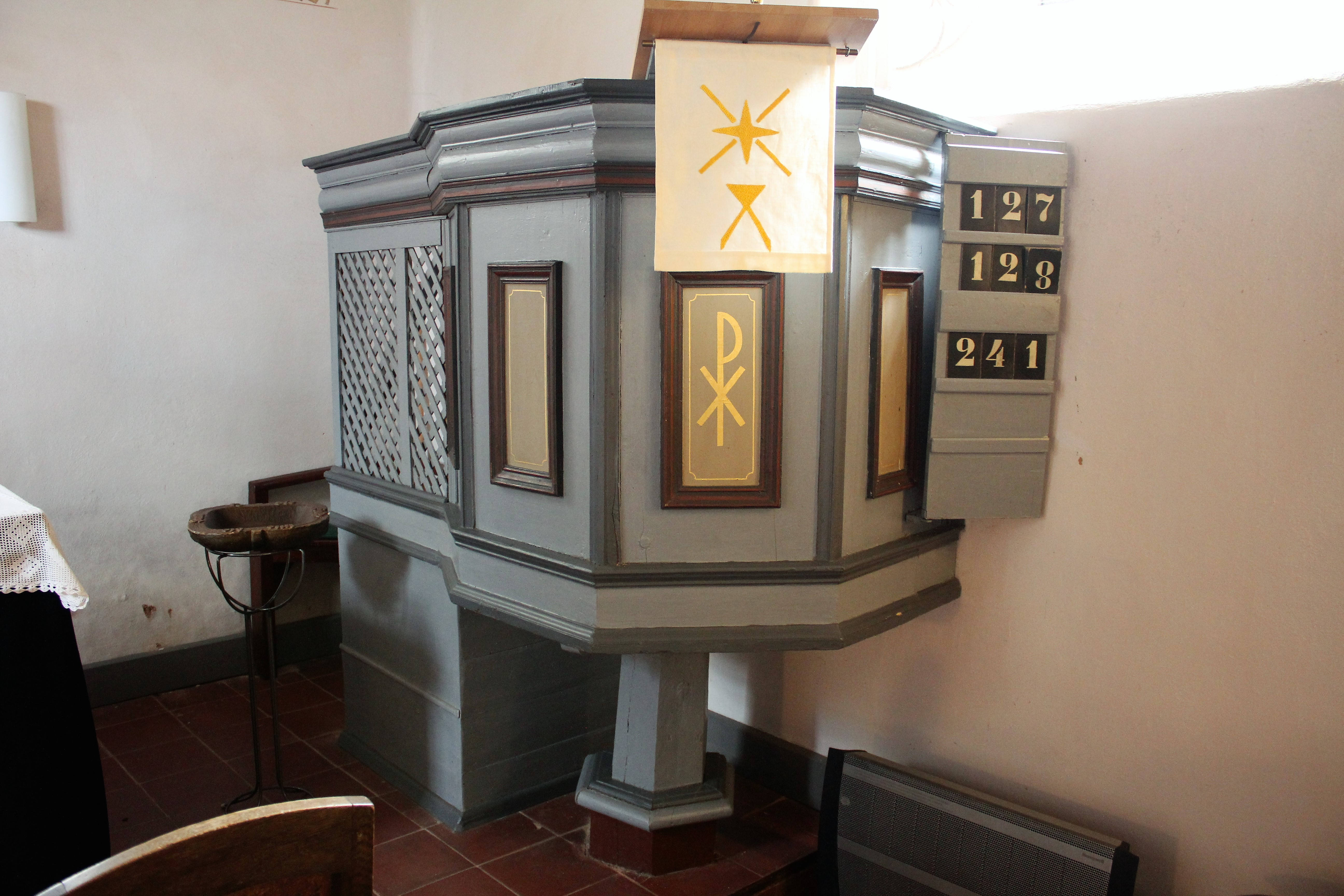 Alte Kirche Weidenhausen, Gemeinde Hüttenberg, Lahn-Dill-Kreis, Hessen, Deutschland